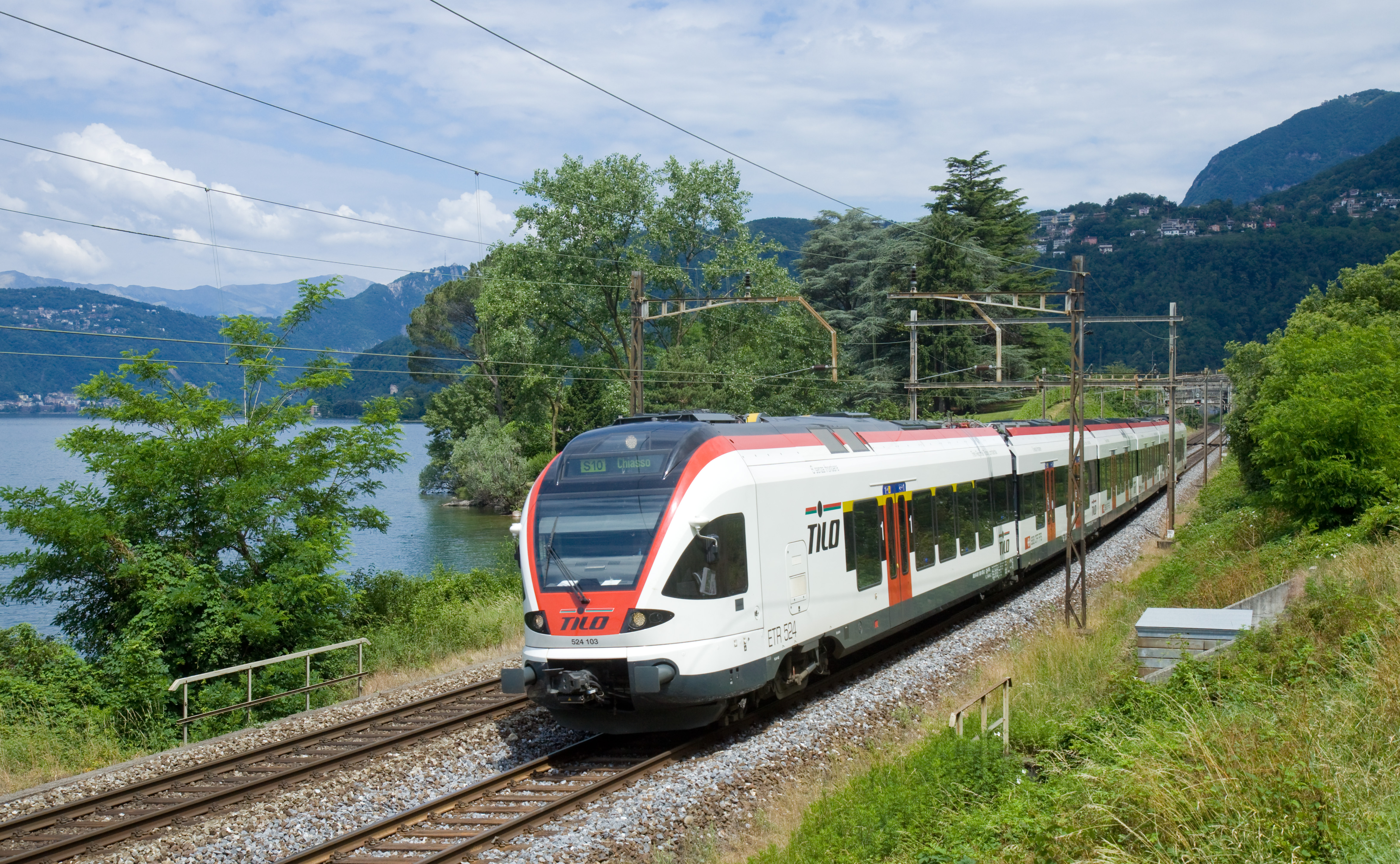 Treno della linea S10 della rete celere del Canton Ticino, in corsa fra le stazioni di Capolago e Maroggia-Melano